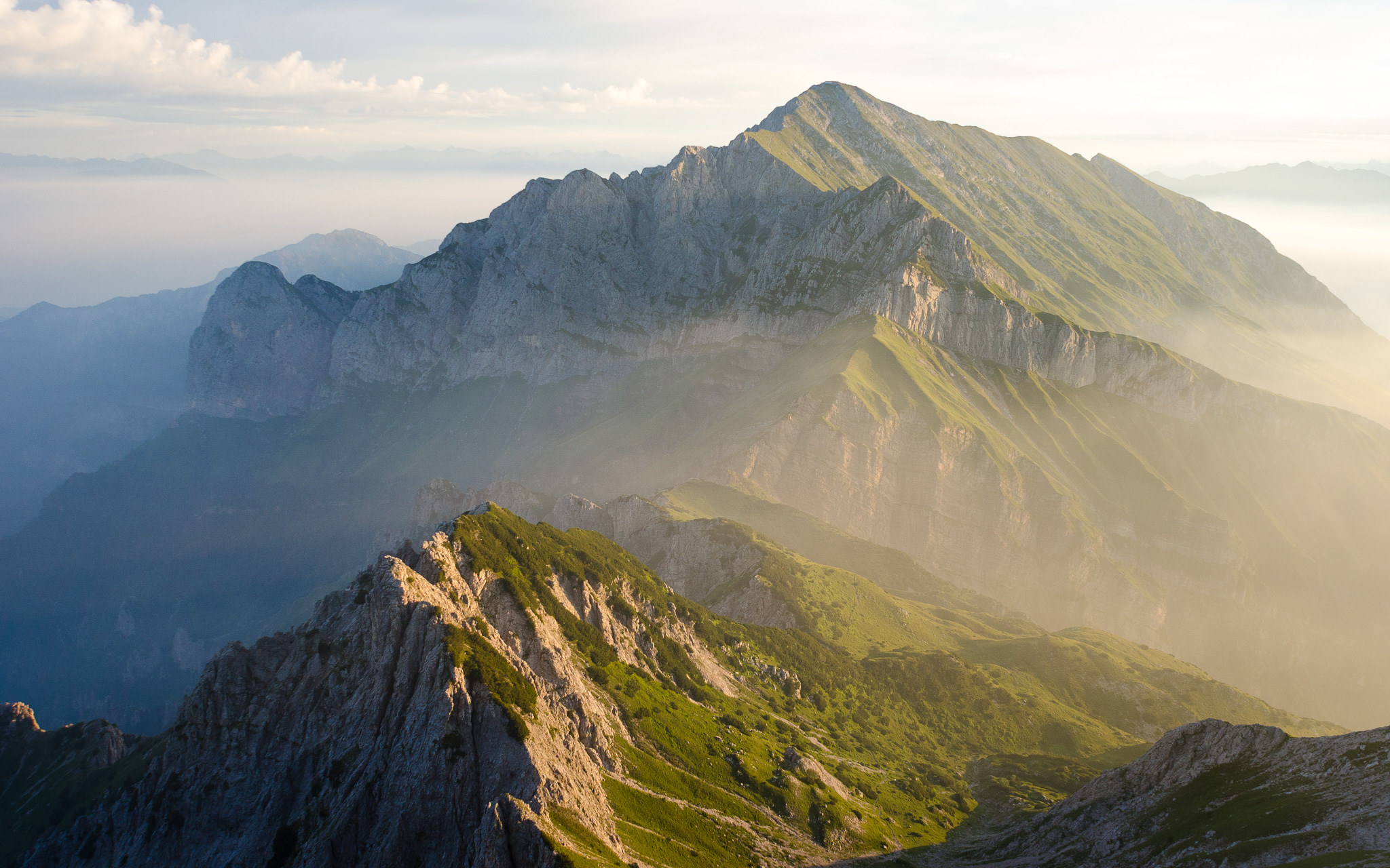 Vista panoramica del Grigna e della Grignetta.